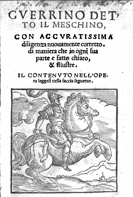 Copertina di un'edizione del Guerrin Meschino datata 1562